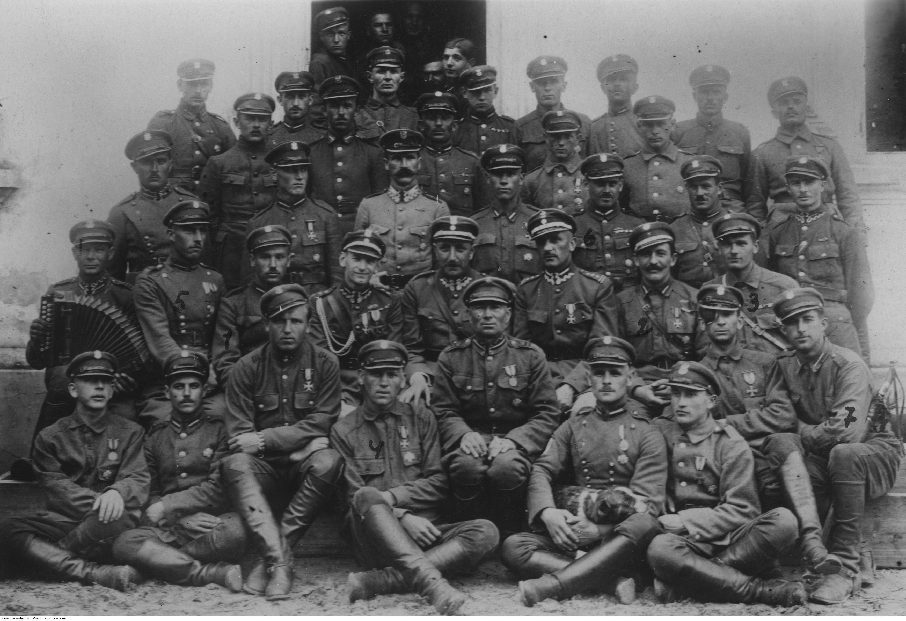 Oficerowie i podoficerowie 14. Pułku Ułanów Jazłowieckich - fotografia grupowa; 1921 r. W drugim rzędzie siedzą od lewej: NN, plut. Władysław Gwoździński, wachm. Bronisław Gadzin, ppor. Witold Czaykowski, mjr Albert Wielopolski (d-ca pułku), płk Konstanty Plisowski (d-ca brygady), chor. Bronisław Małek, plut. Strzelbicki. Koncern Ilustrowany Kurier Codzienny - Archiwum Ilustracji. Sygnatura: 1-W-1404